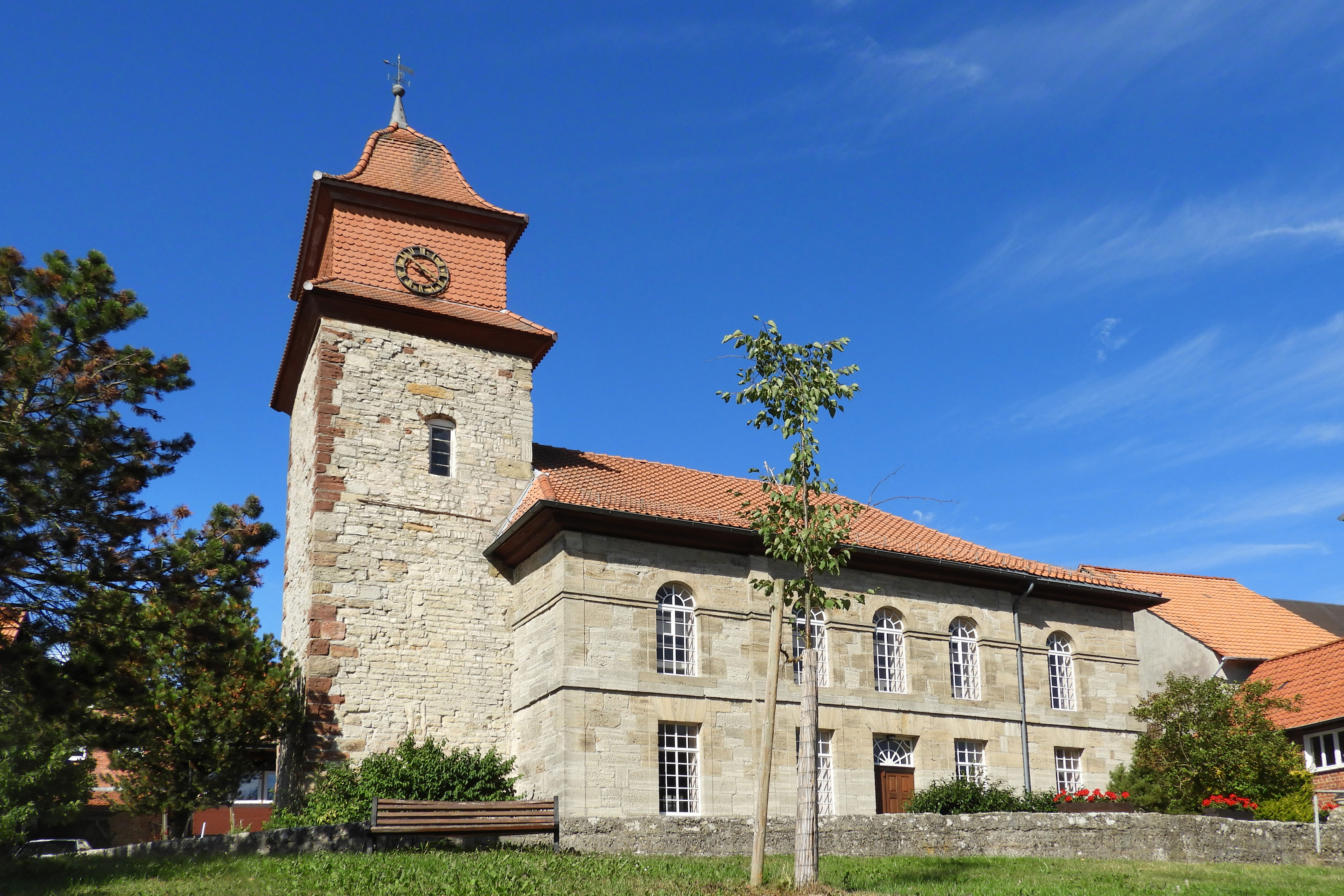 Der älteste Teil der evangelischen Kirche Grandenborns ist der romanische Wehrturm aus dem 12. Jahrhundert, der im Jahr 1798 mit einer aufgesetzten Haube geschlossen wurde. Das angesetzte Schiff wurde 1840 im klassizistischem Stil nach den Entwürfen des Landbaumeisters Anton Jakob Spangenberg erbaut. Die Kirche ist aus künstlerischen, geschichtlichen und städtebaulichen Gründen ein geschütztes Kulturdenkmal. Grandenborn ist ein Ortsteil der Gemeinde Ringgau im nordhessischen Werra-Meißner-Kreis.